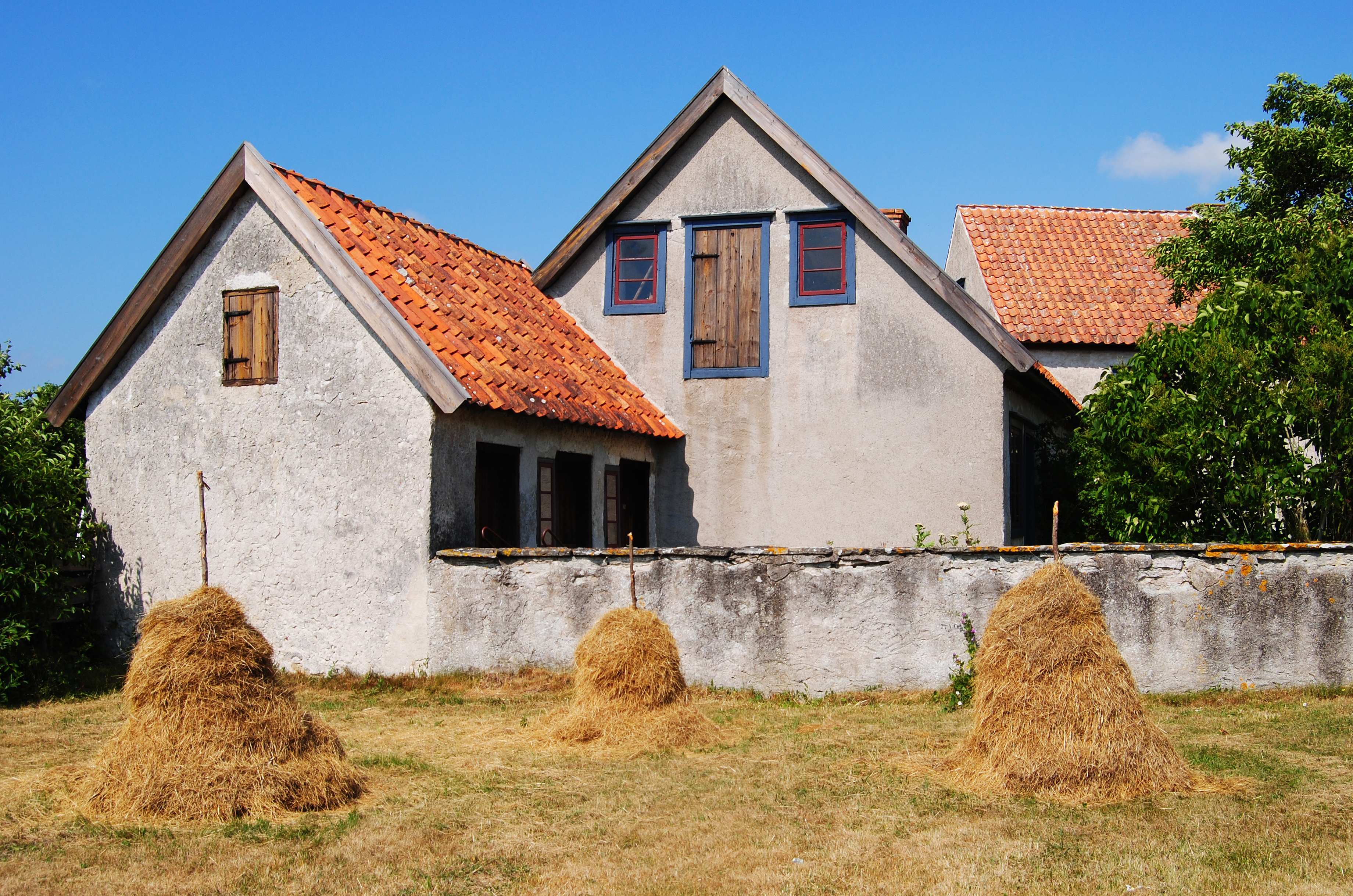 Museigården Petes i Hablingbo, Gotland. Caféflygeln.